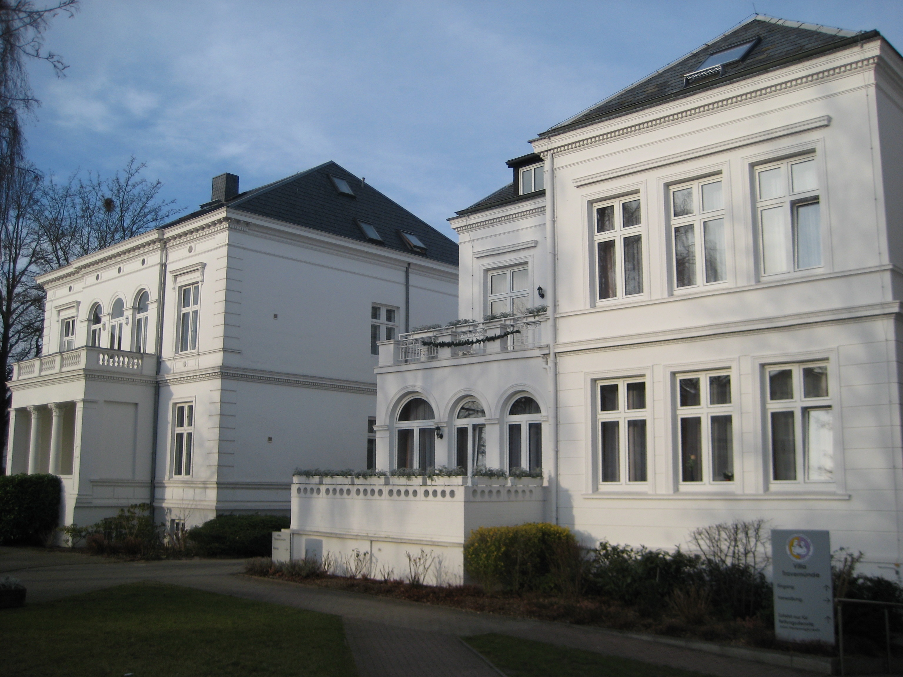 Wohnbebauung in der Travemünder Allee in Lübeck, Hausnummer 17a (links) und 19